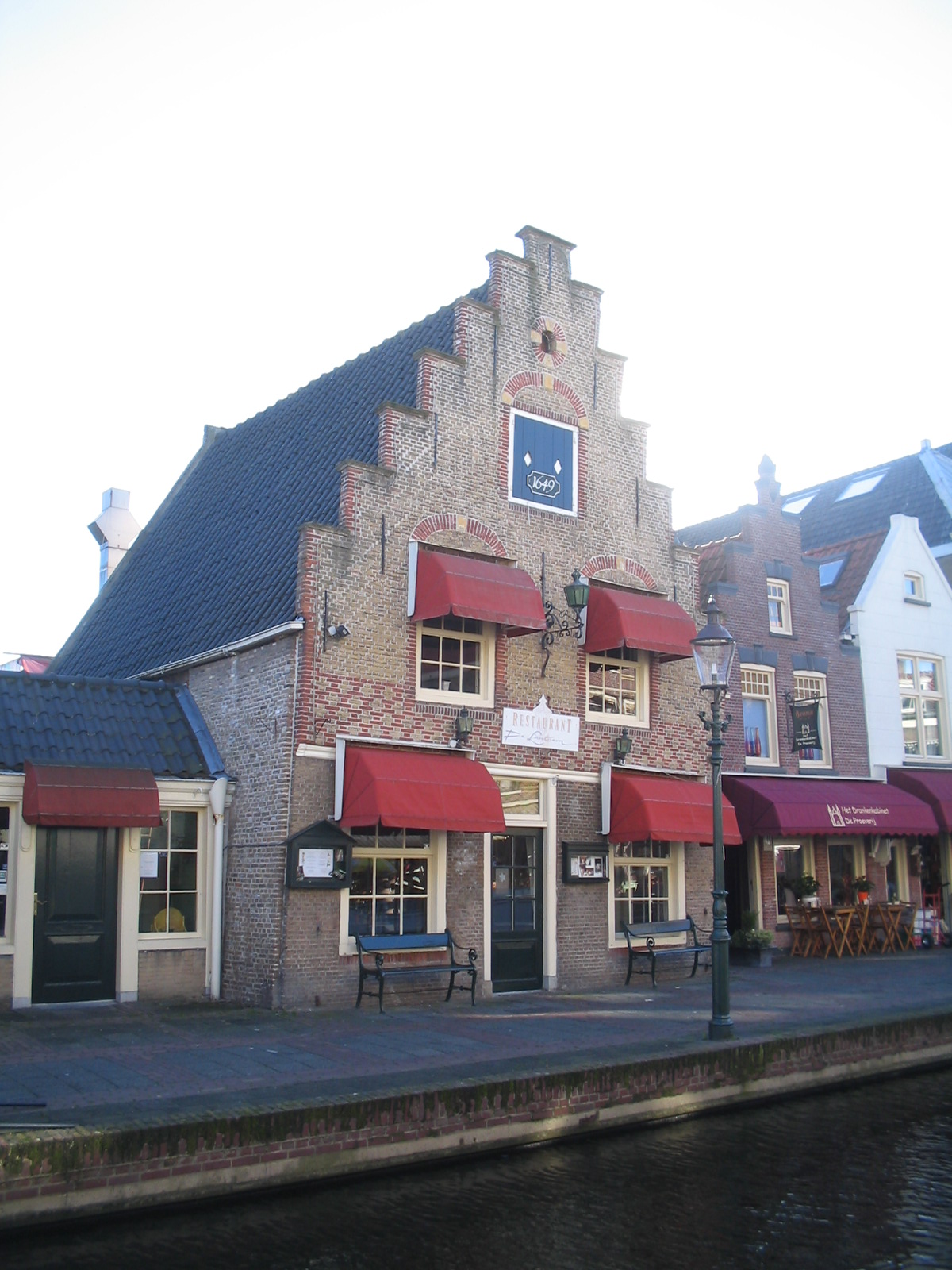 Woning uit 1649 langs de Zuidvliet (Zuidvliet 12), Maassluis.